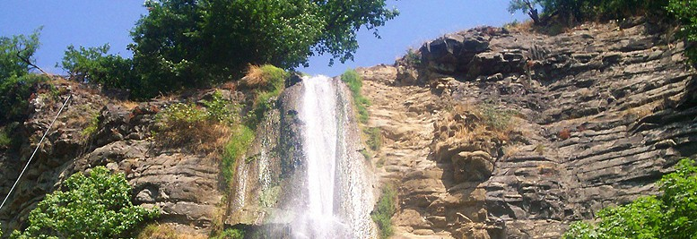 Qusarçayın sol qolu Ləzəçayda şəlalə